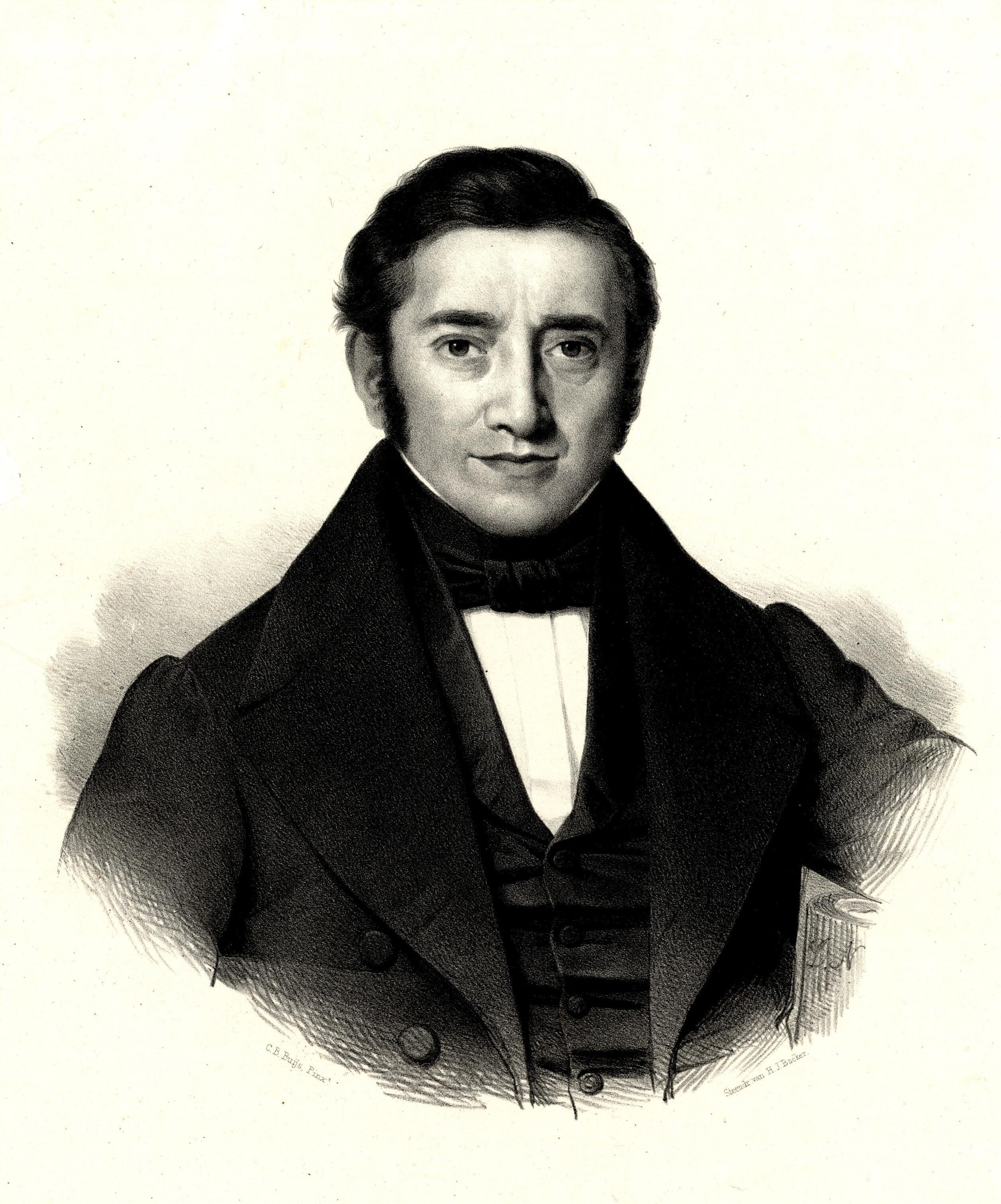 Portret Berend_Brugsma_(1797-1868)